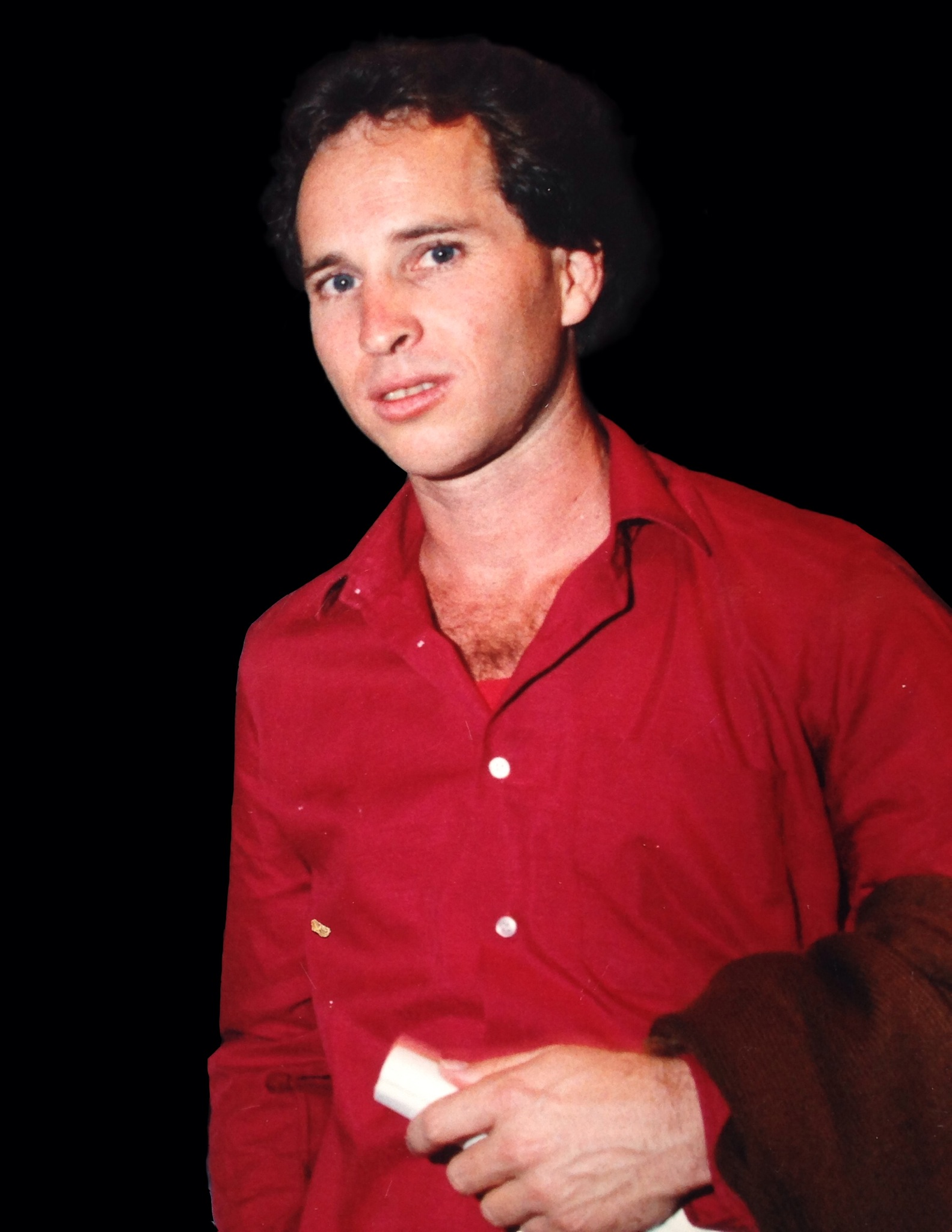 ירון מרגולין - צילום: אלדד ברון 1987